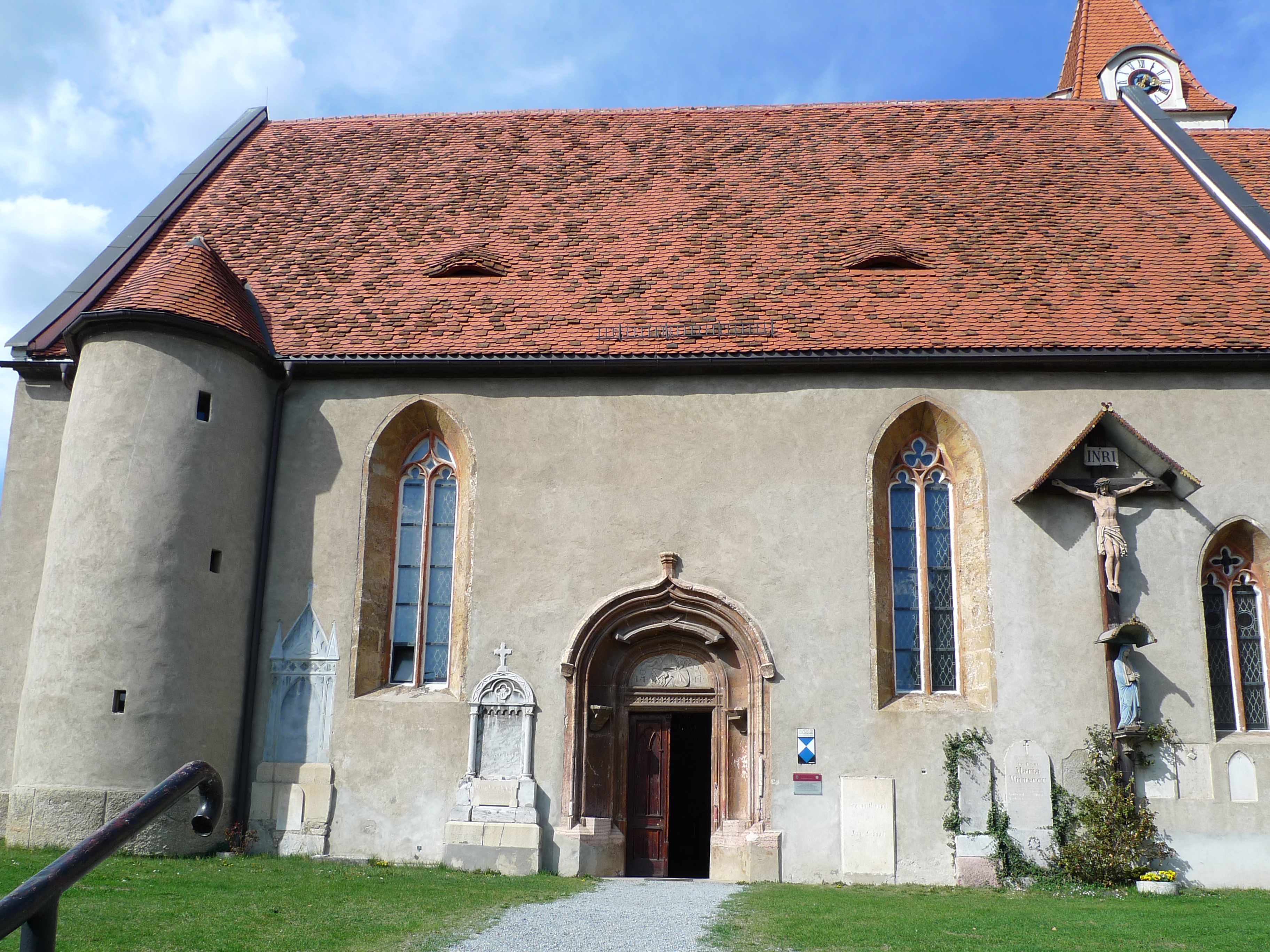 Kath. Pfarrkirche hl. Rupert mit Kirchhof, Ummauerung, Freitreppe und Verbindungsgang zum Pfarrhof